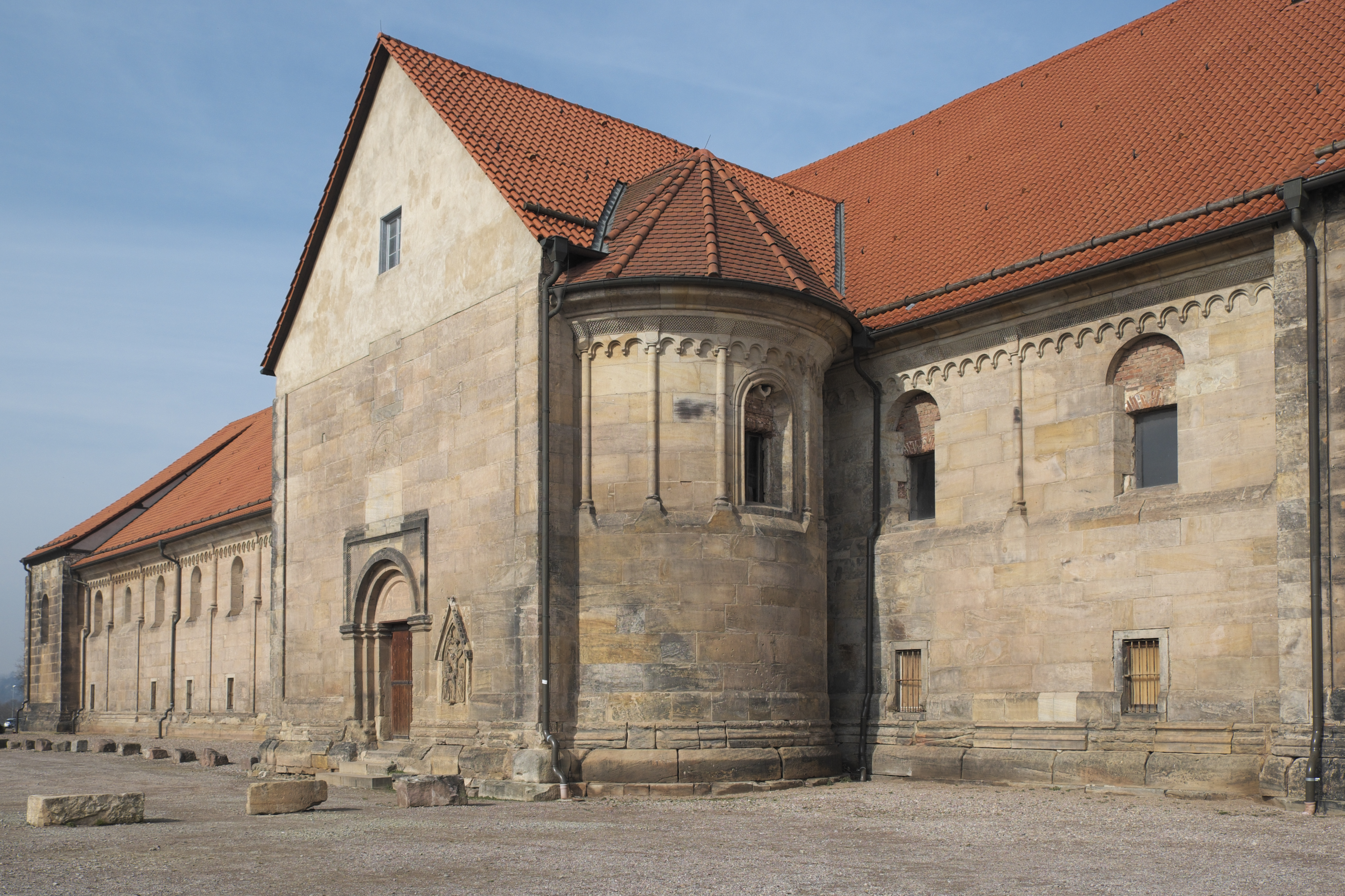 Peterskirche auf dem Petersberg in der Altstadt in Erfurt (Thüringen/Deutschland)